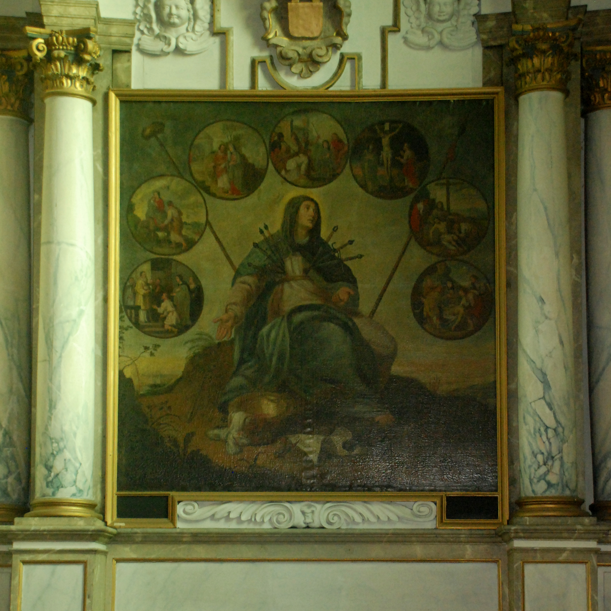 Belgique - Brabant wallon - Église de Court-Saint-Étienne